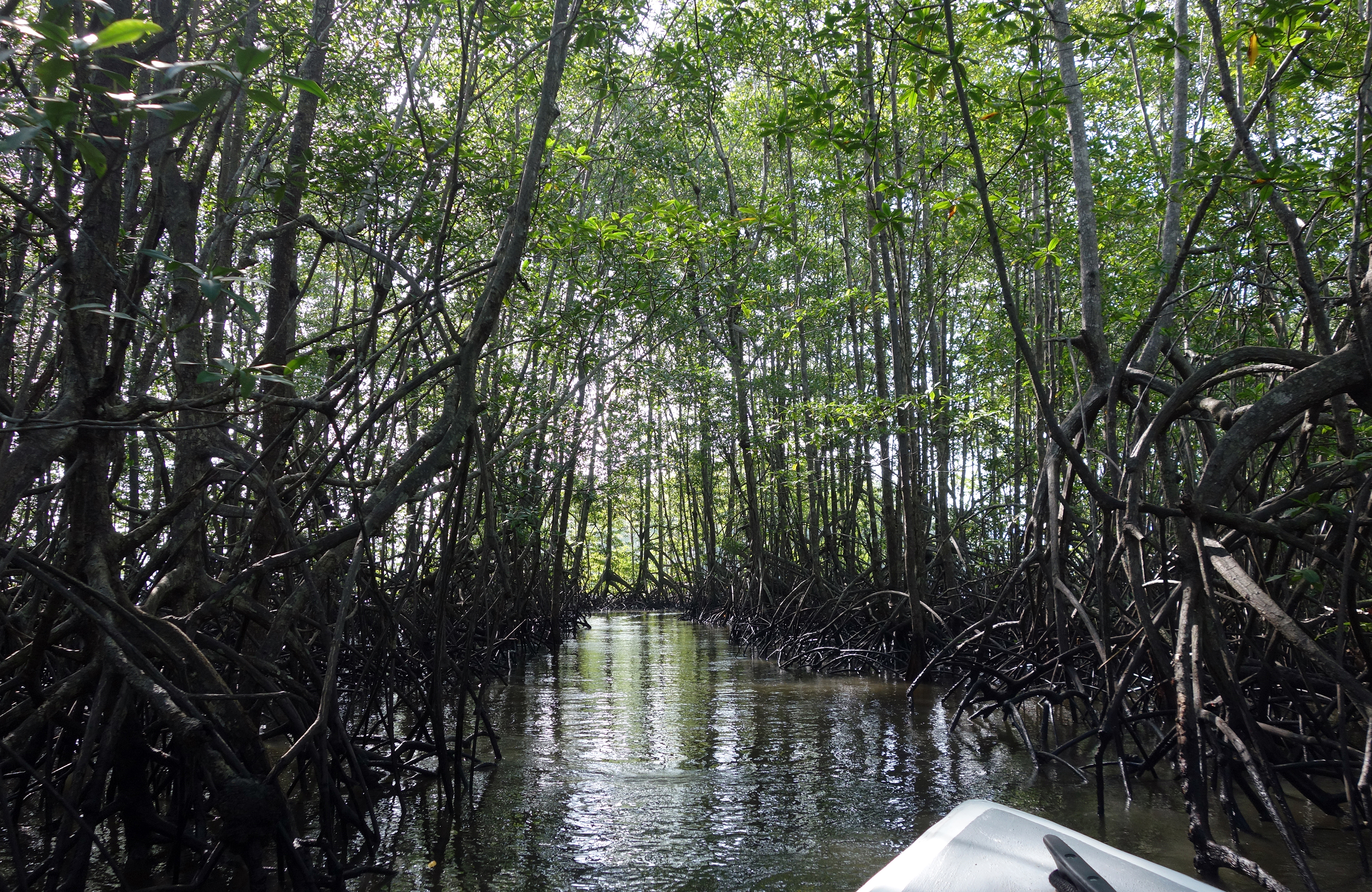 Mangrover i Térraba Sierpe våtmarksområde i Osa kanton i Costa Rica